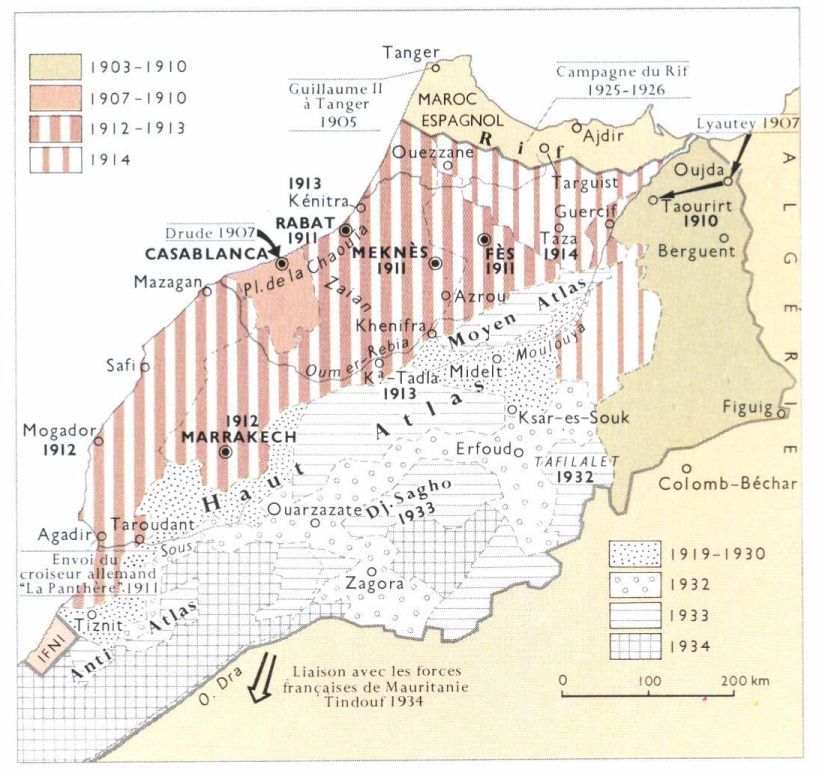 Pacificatin du Maroc